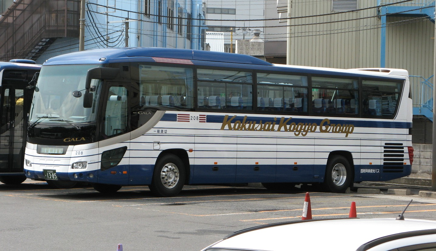 国際興業観光バスの車両208号車（いすゞ・形式名PKG-RU1ESAJ）。国際興業観光バス戸田営業所（国際興業戸田営業所）敷地外より撮影。